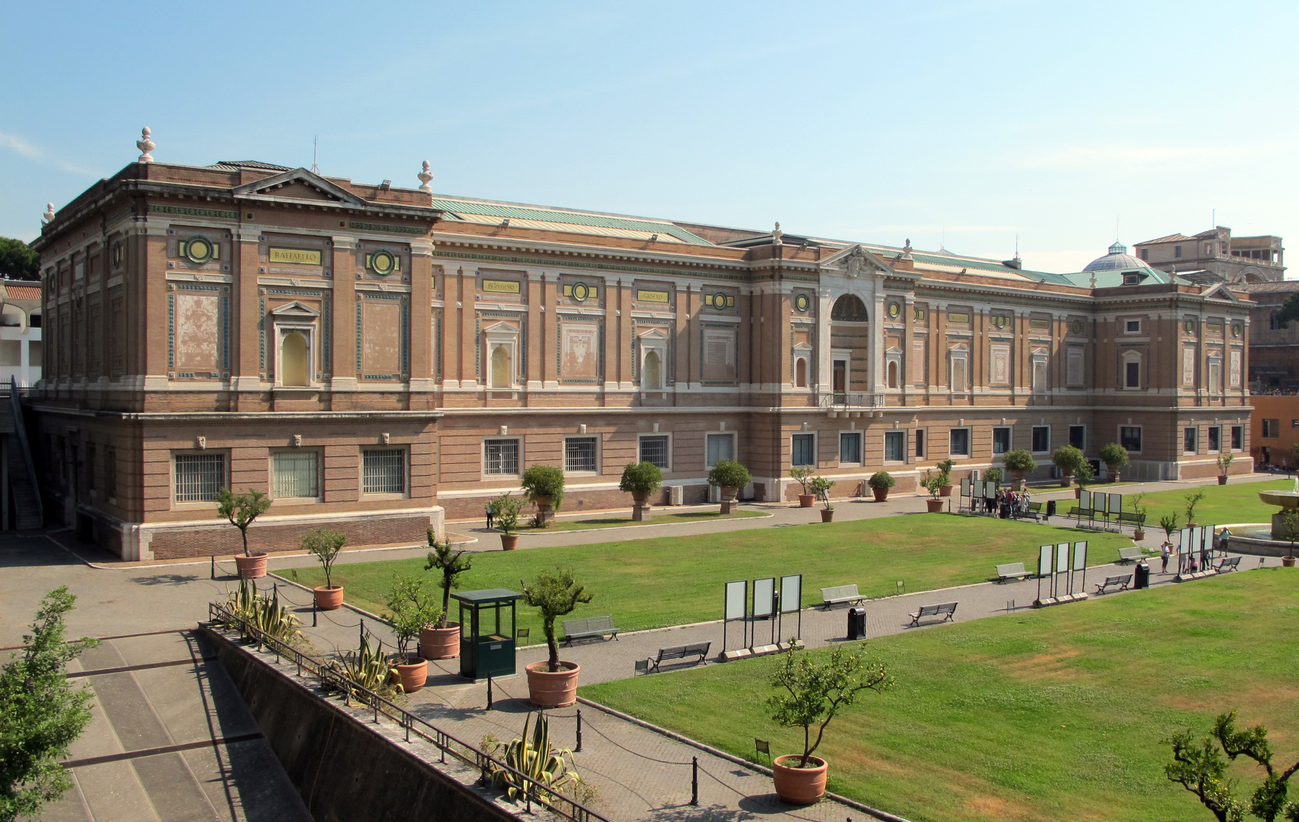 Pinacoteca Vaticana